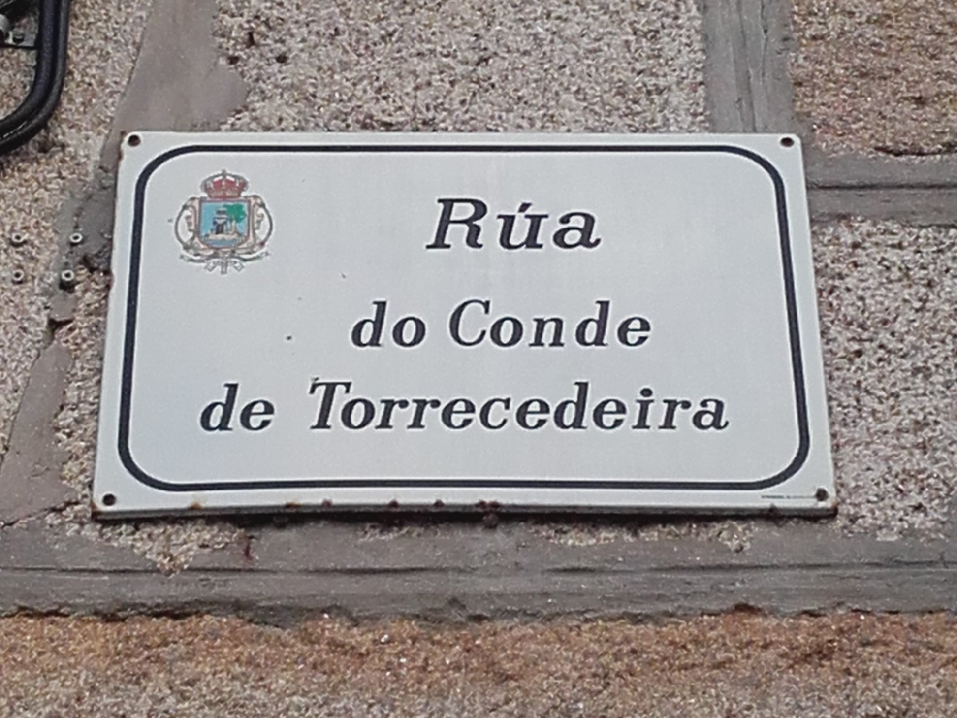 Rúa do Conde de Torrecedeira (Vigo).